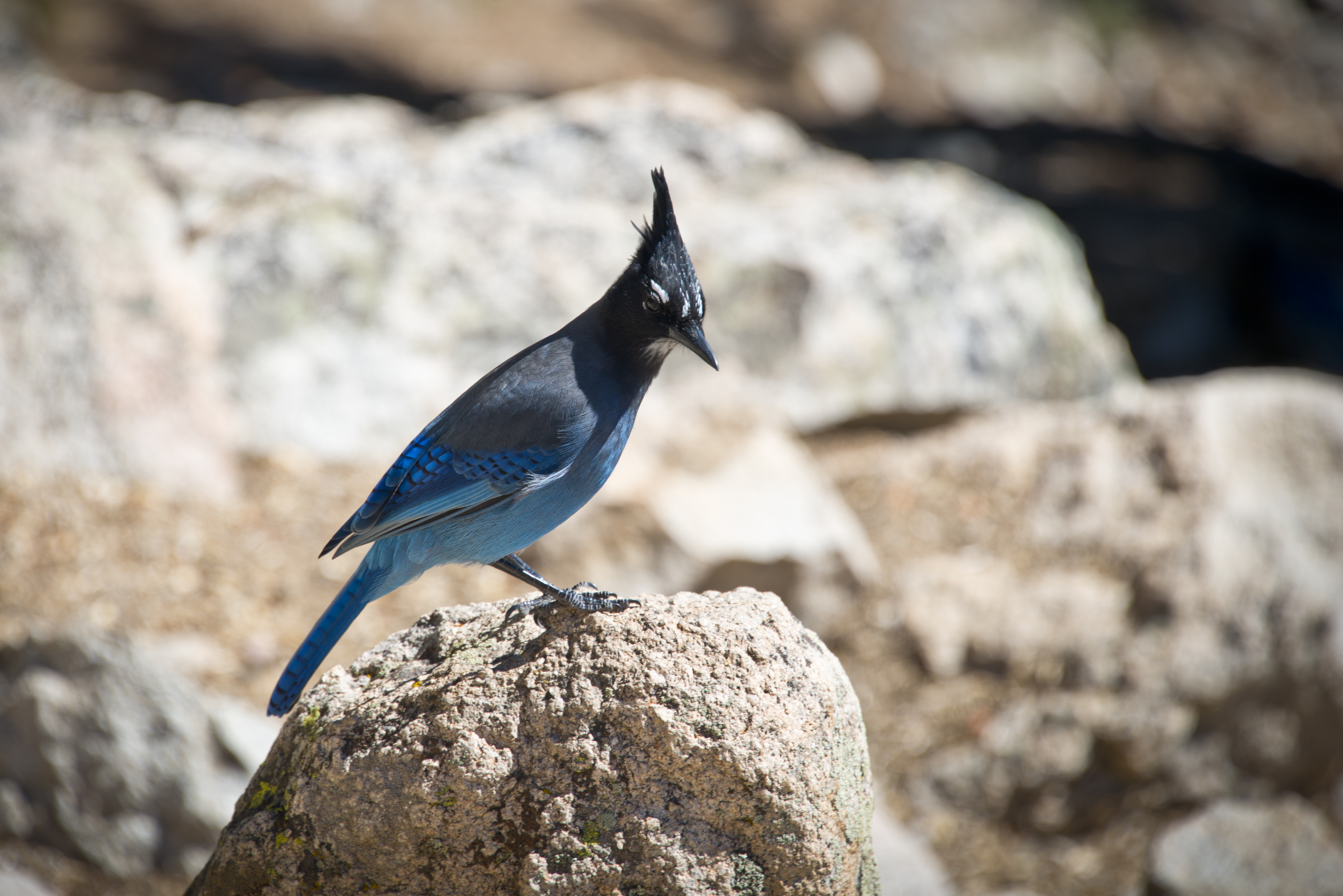 Arrendajo de Steller en Colorado.